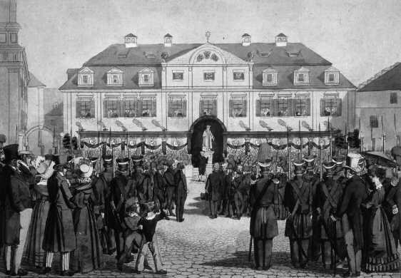 Enthüllung der Melanchton-Statue anlässlich der 300-Jahr-Feier des Melanchthon-Gymnasiums in Nürnberg am 23. Mai 1826. Kolorierte Lithographie, Graph. Sammlung der Stadt Nürnberg. Im Hintergrund die Fassade des Gymnasiums.